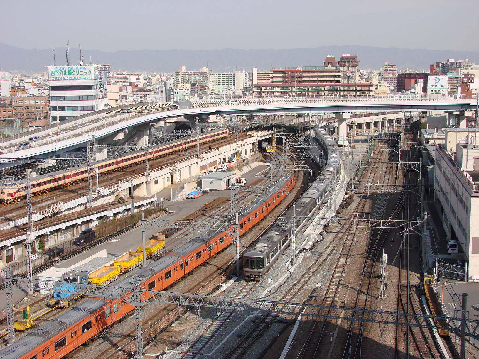 複線化された阪和連絡線